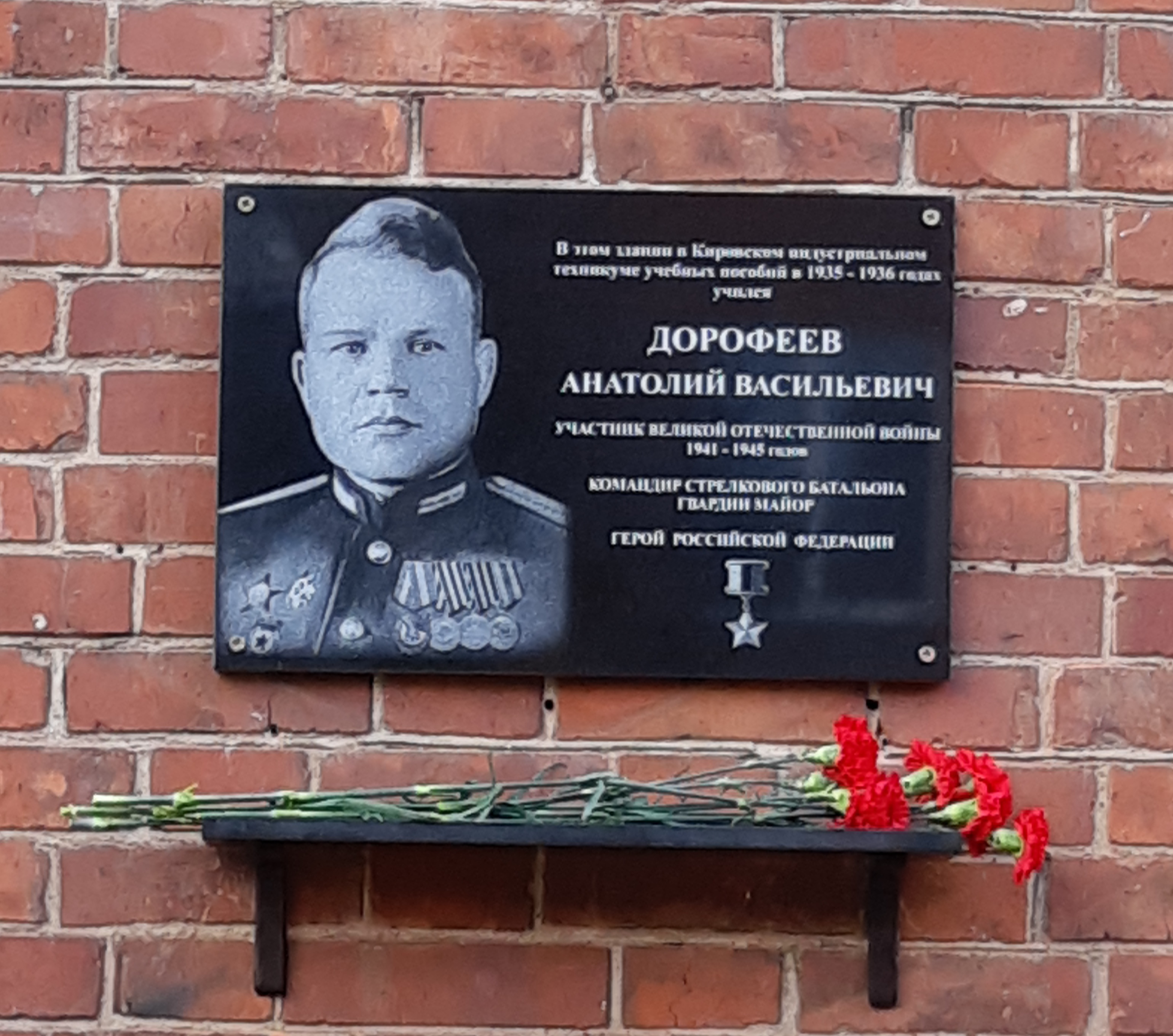 Мемориальная доска Дорофееву Анатолию Васильевичу. Киров ВХУ 2019